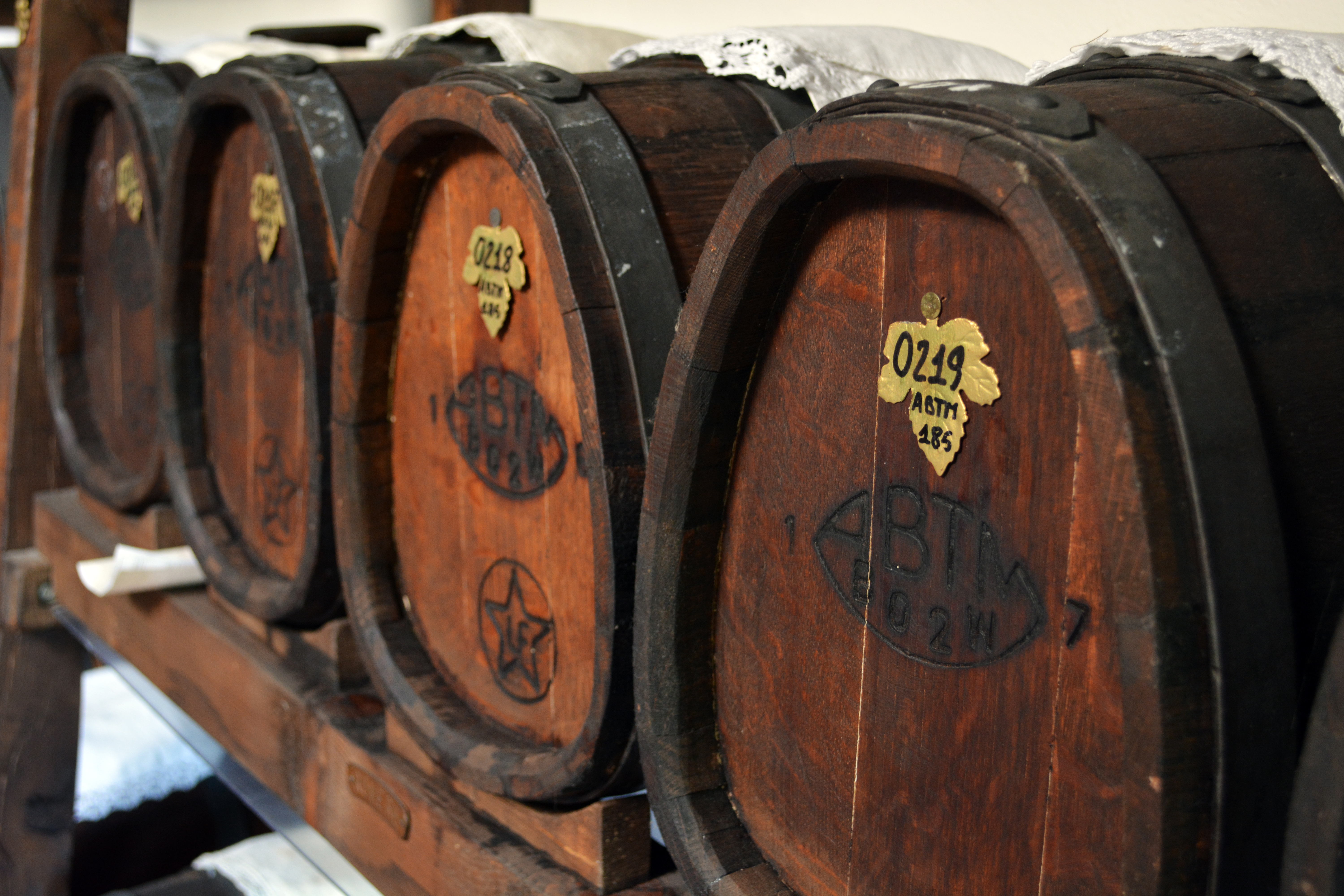 Modena